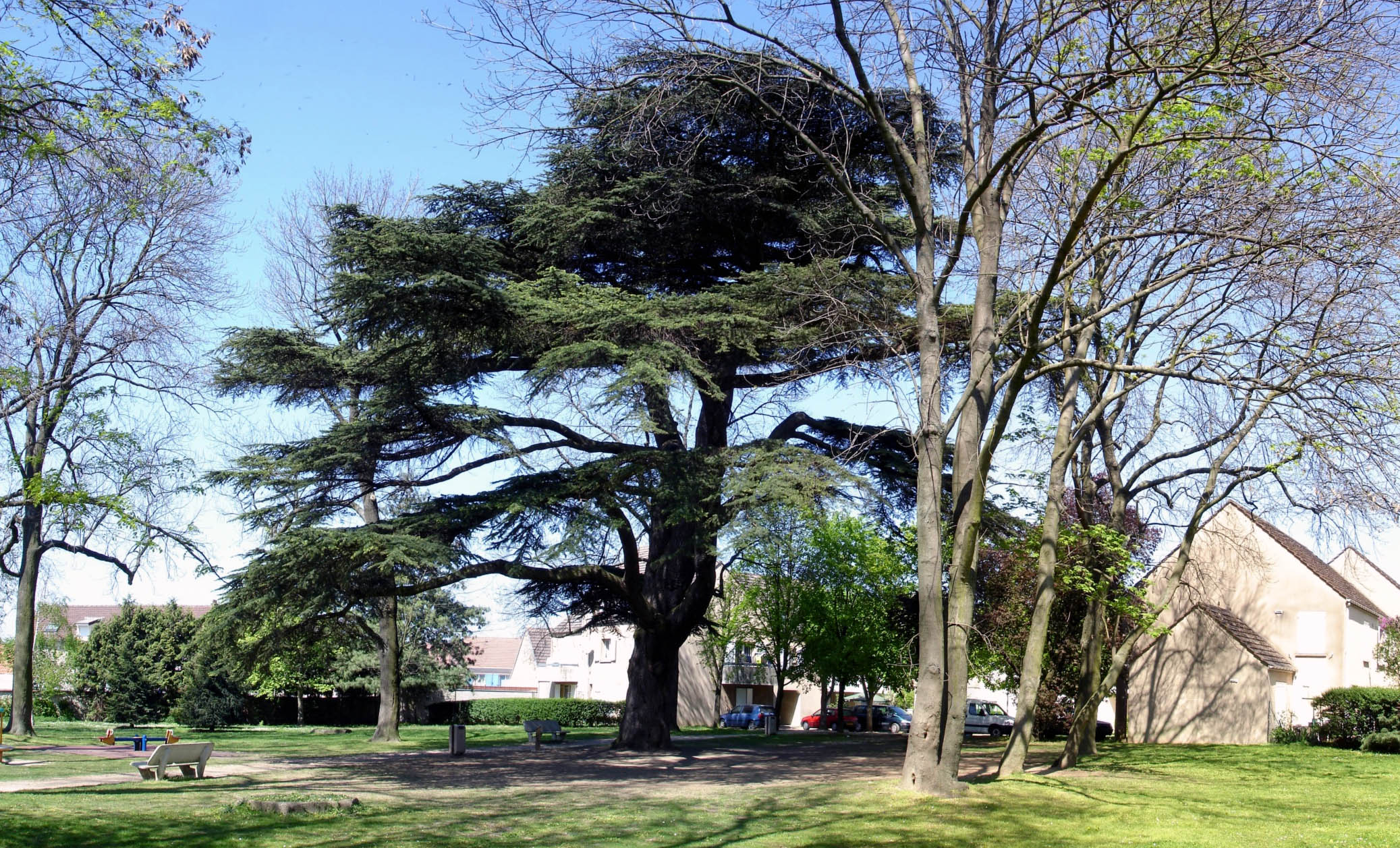 Parc du Cèdre à Roissy-en-France (Val-d'Oise), France